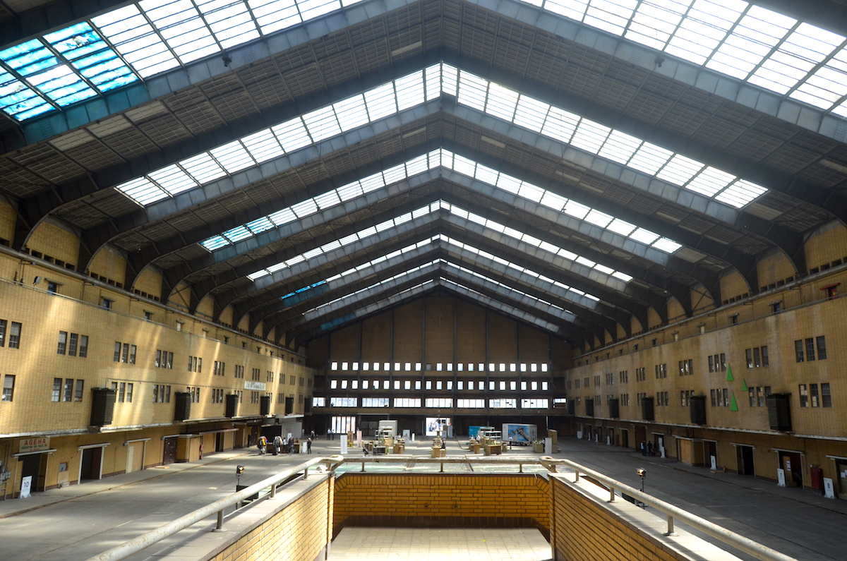 Centrale Markthal te Amsterdam-West - interieur (4); juni 2019. Foto: Erik Swierstra.